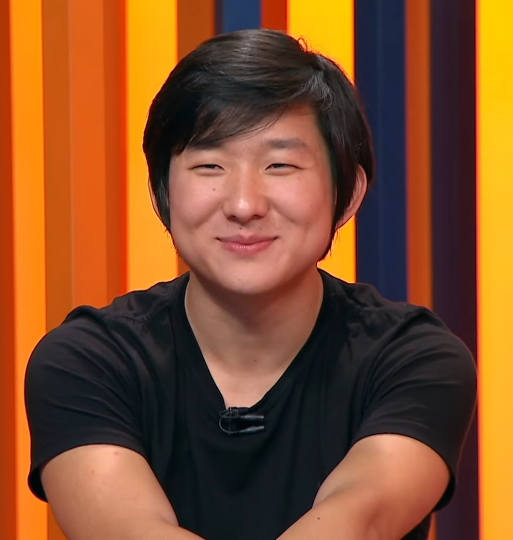 Pyong no programa a Eliminação em março de 2020.